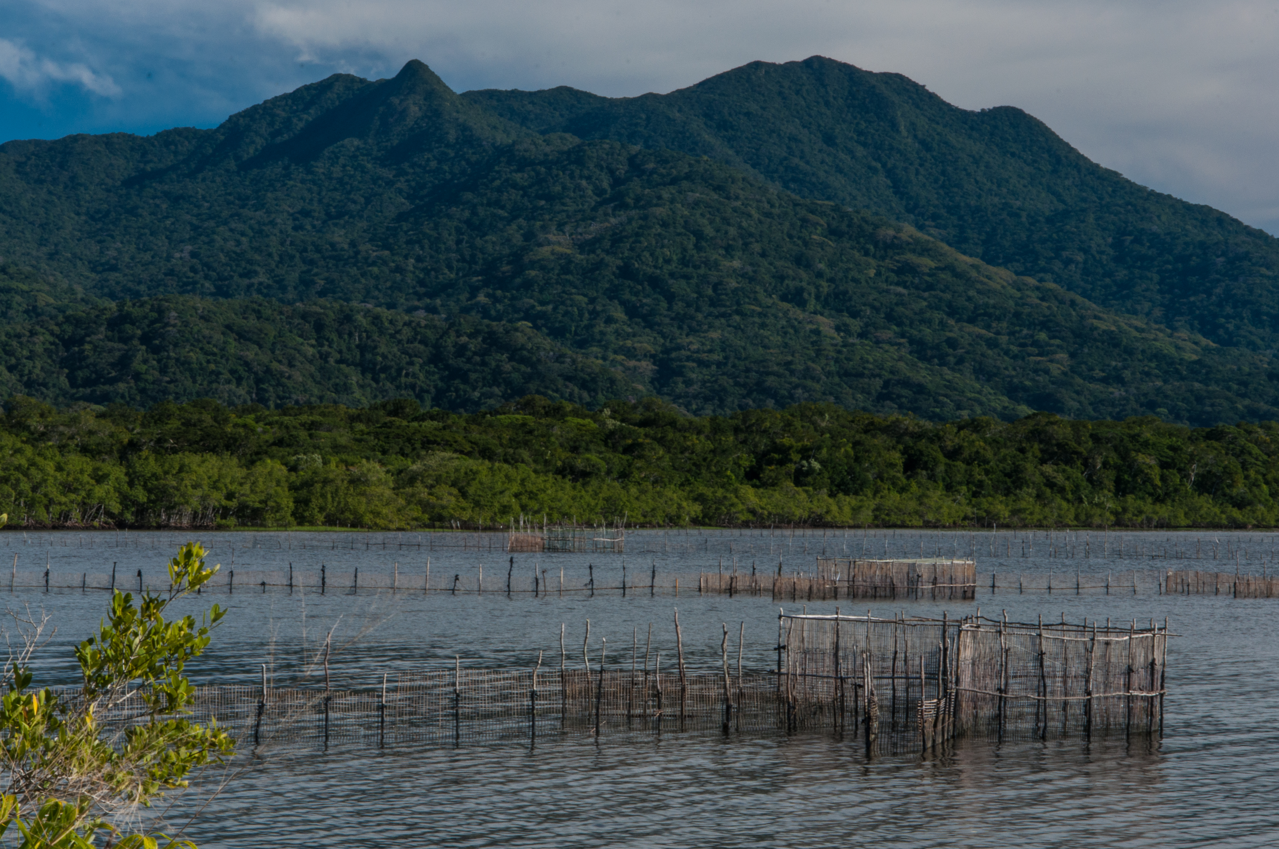 Estruturas de pesca tradicional no Parque Estadual da Ilha do Cardoso